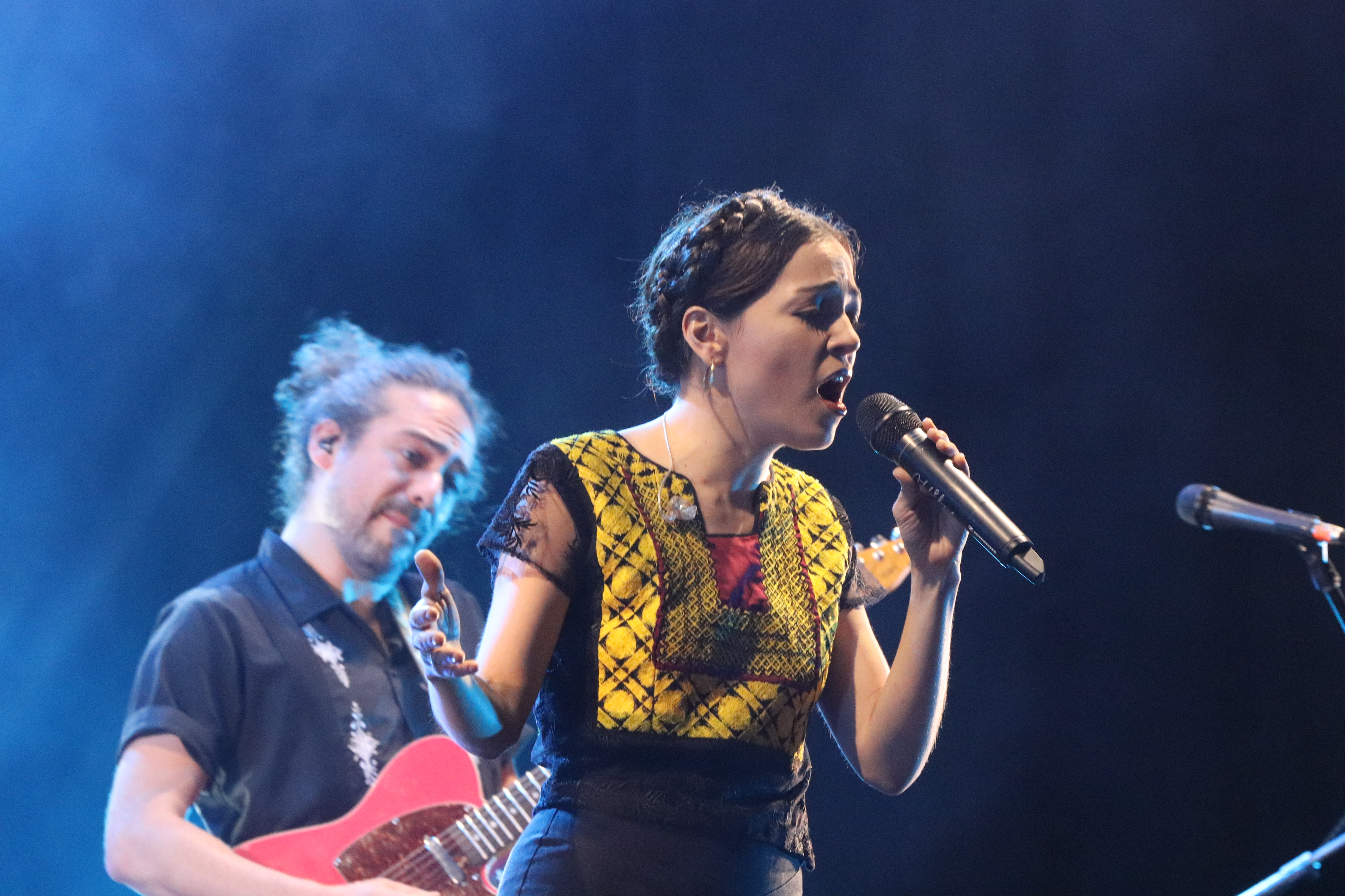 Recital de Natalia Lafourcade el 26 de Abril de 2018 en el Gran Rex